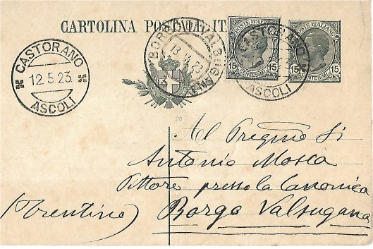 Cartolina postale spedita da Castorano (Ascoli Piceno) il 12 maggio 1923 da Sigismondo Nardi al pittore Antonio Mosca via dei Cappuccini, 6 Bologna per prendere accordi per i lavori di restauro e decorazione della parrocchia di Borgo Valsugana